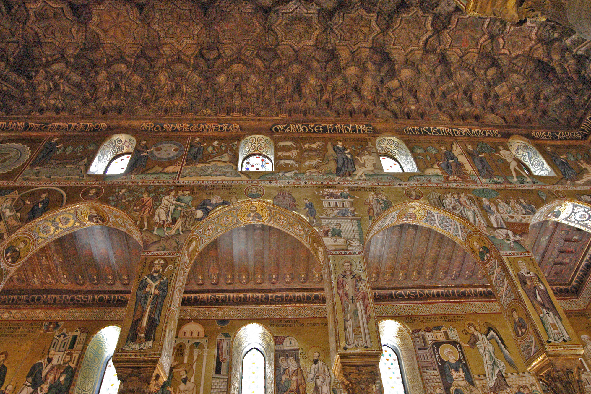 Cappella Palatina, Wand eines Seitenschiffs, Obergadenwand und Gewölbe des Mittelschiffs